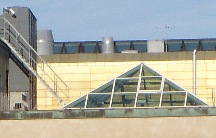 G4S i Västberga industriområde, glaspyramiden på taket